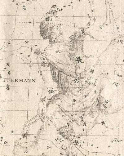 Auriga, Stich von 1782